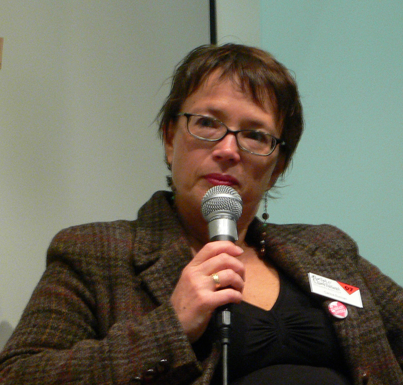 Carina Burman at Gothenburg Book Fair 2007, Carina Burman på Bok- och biblioteksmässan 2007